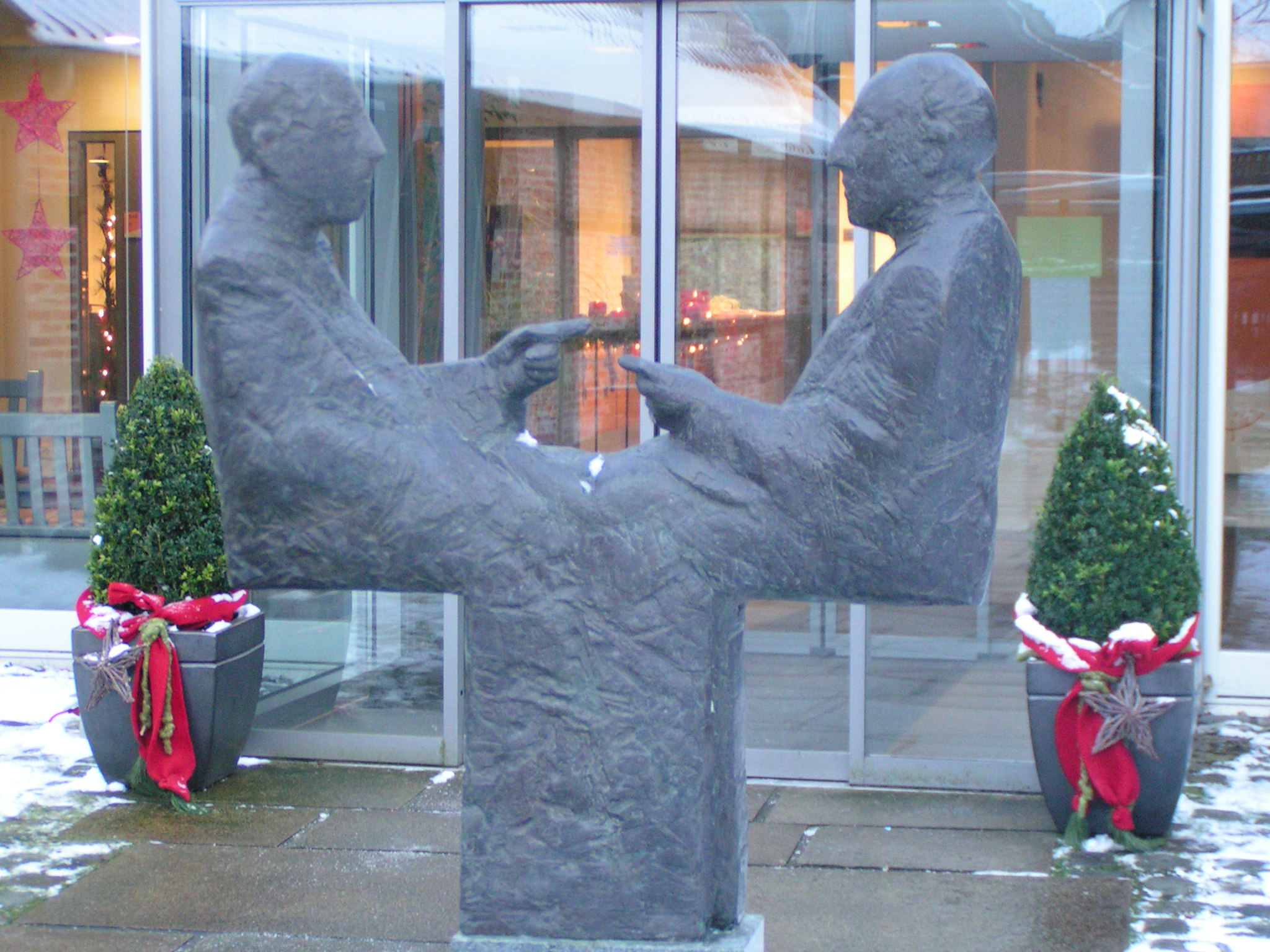 Skulptur "Disput" vor dem Eingang des "Hauses der Bildung" in Lohne (Oldenburg)